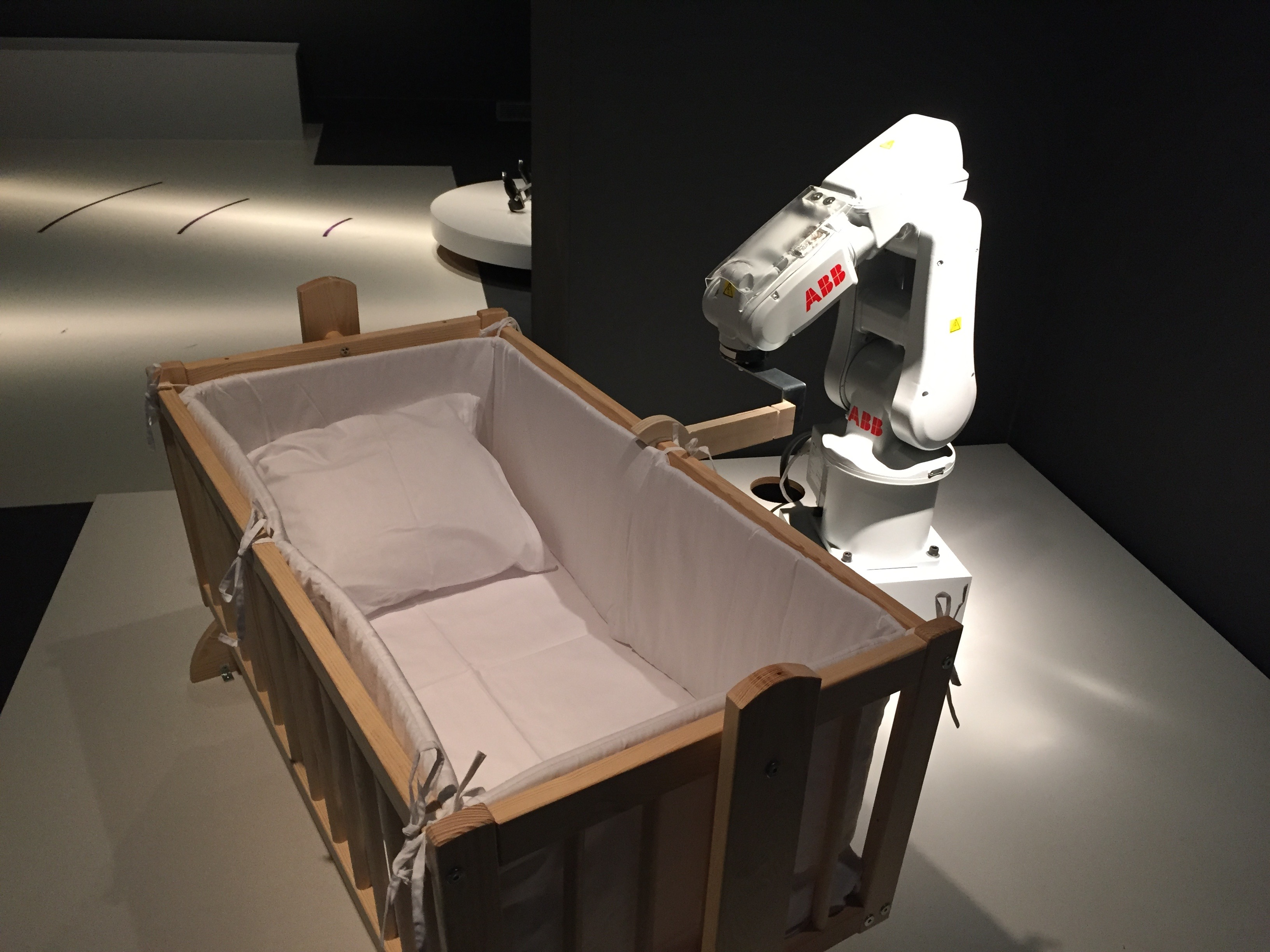 +Humans, exposició que va tenir lloc la tardor de 2015 al Centre de Cultura Contemporània de Barcelona